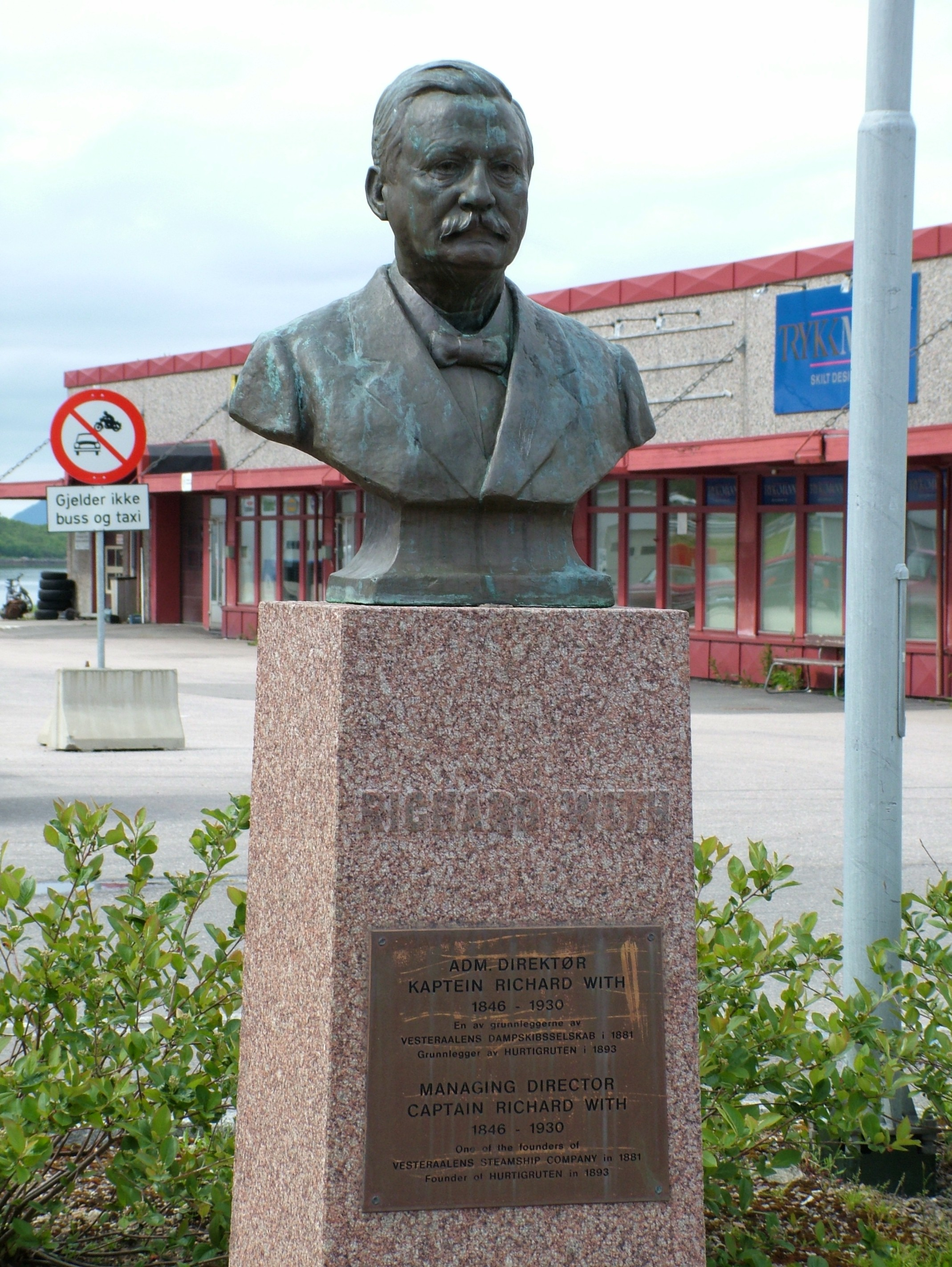 Denkmal Richard With in Stokmarknes, Richard With war der Gründer der Hurtigruten.